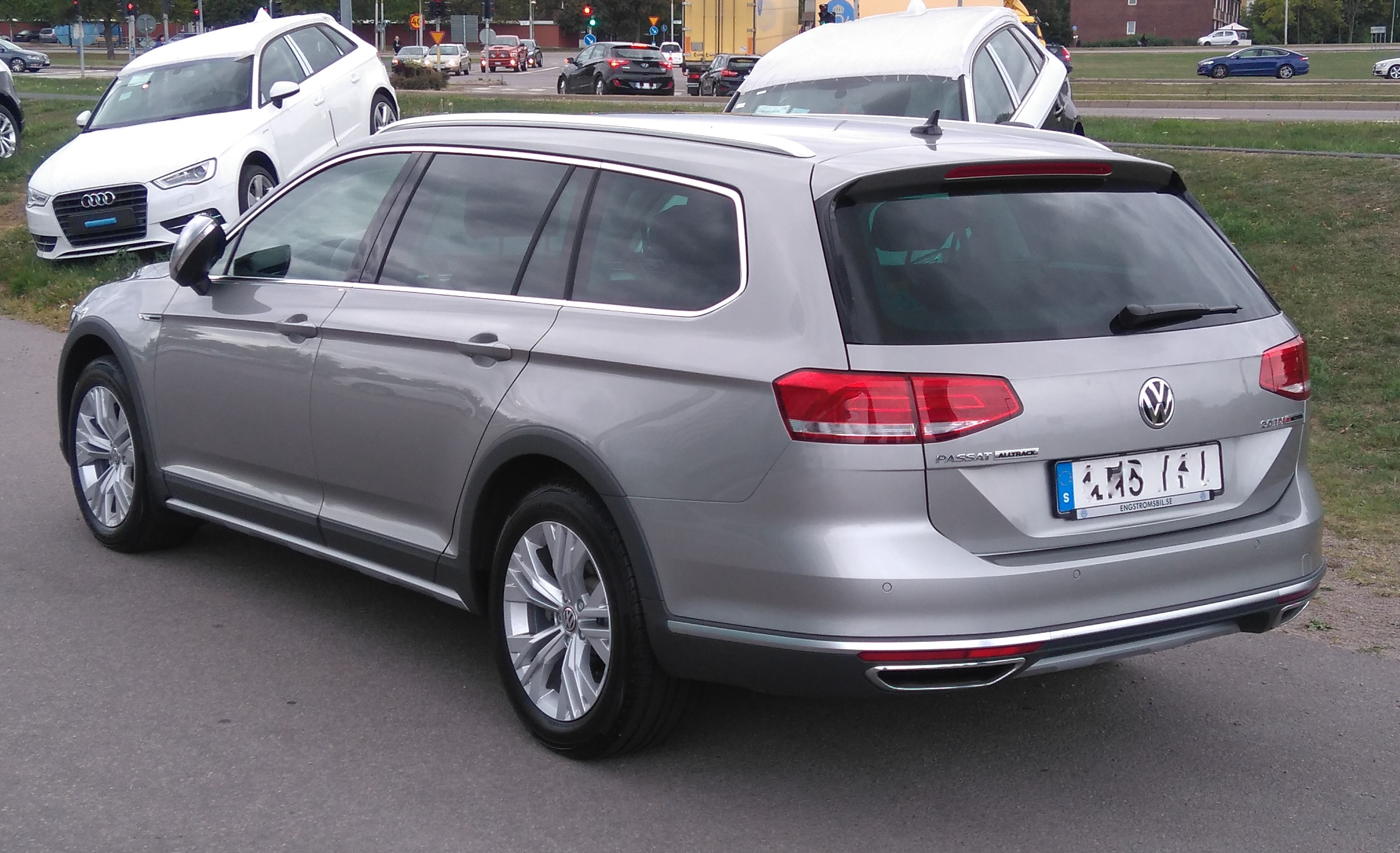 2016 Volkswagen Passat Alltrack